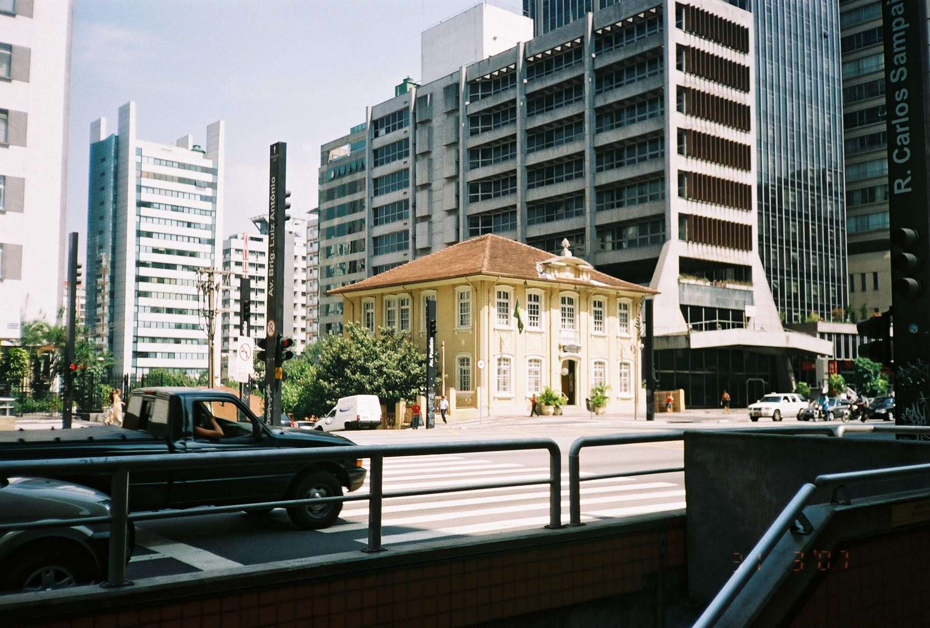 Instituto Pasteur voltado ao sanitarismo público.